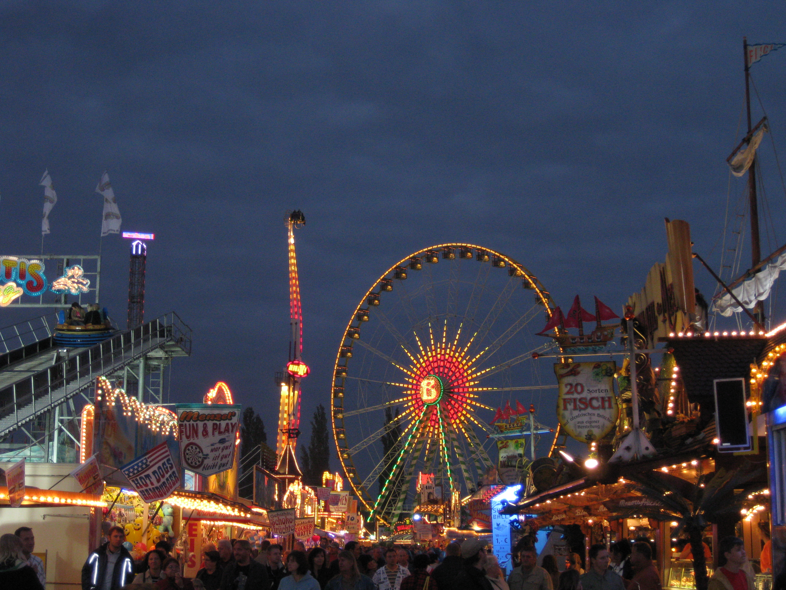 Eisleber Wiesenmarkt 2008